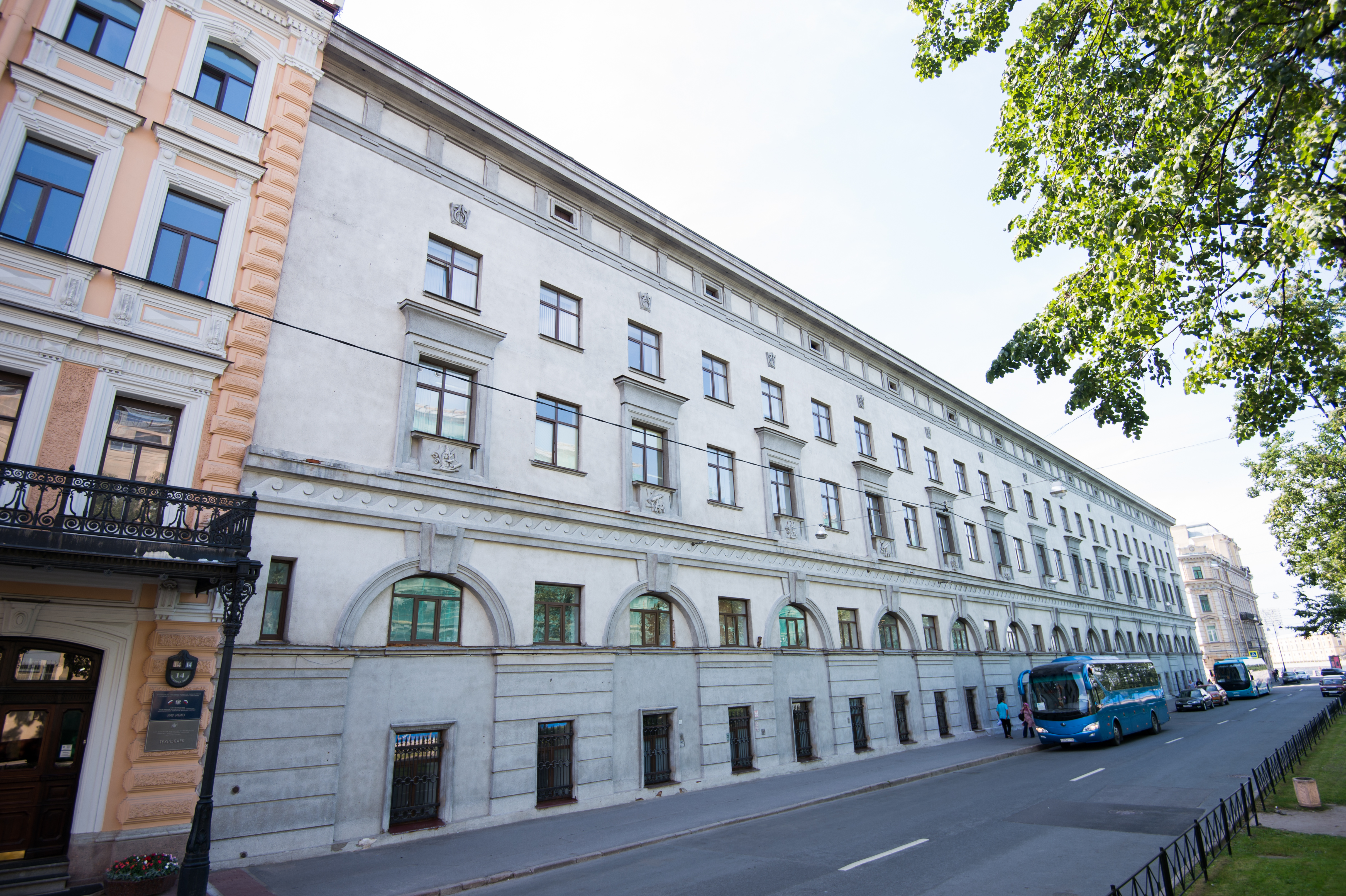 Учебный корпус Университета ИТМО на Биржевой линии, д.16